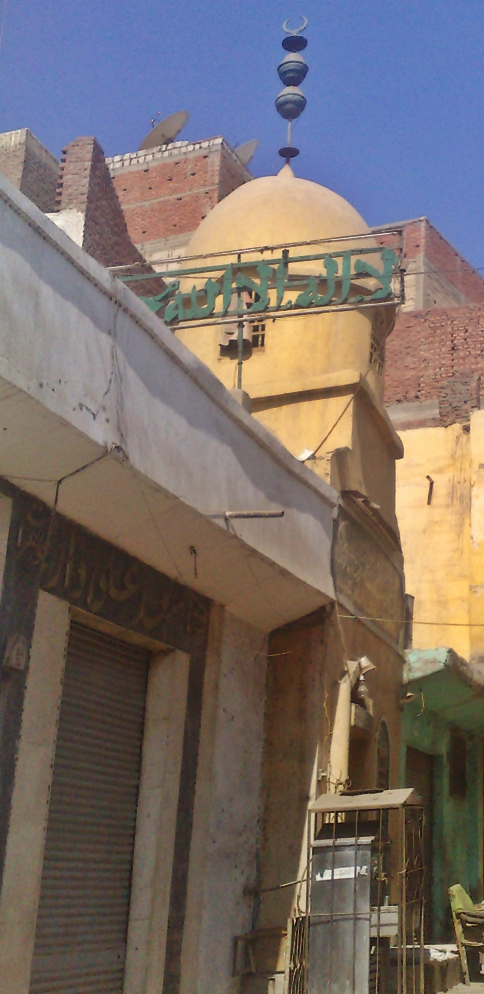 ضريح الشيخ أحمد الكركي، أحد خلفاء المقام الإبراهيمي بدسوق